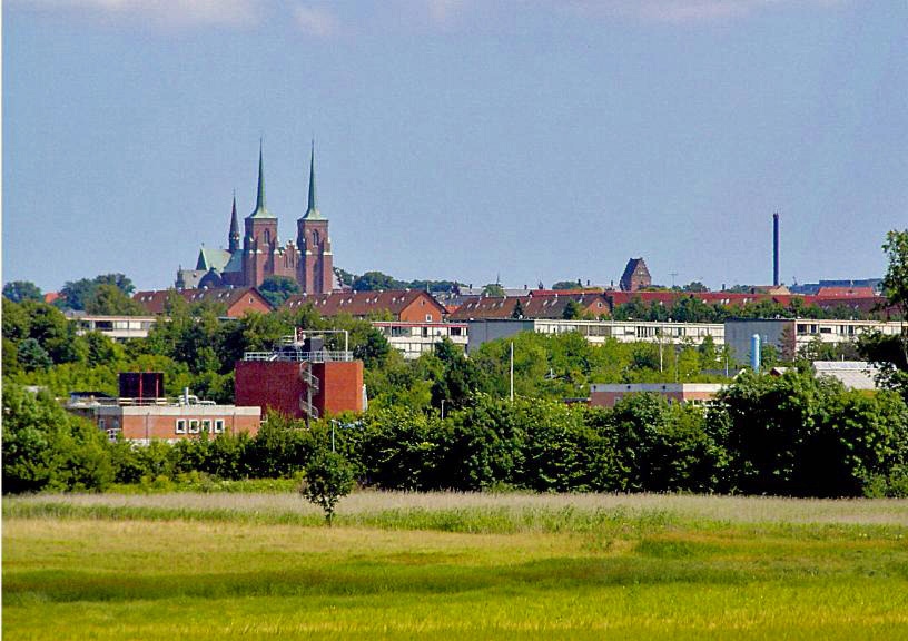 fra vest